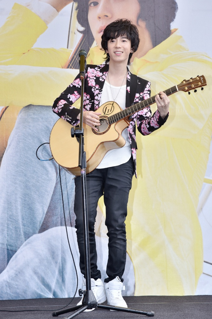 蔣卓嘉『See you again』台北簽唱會